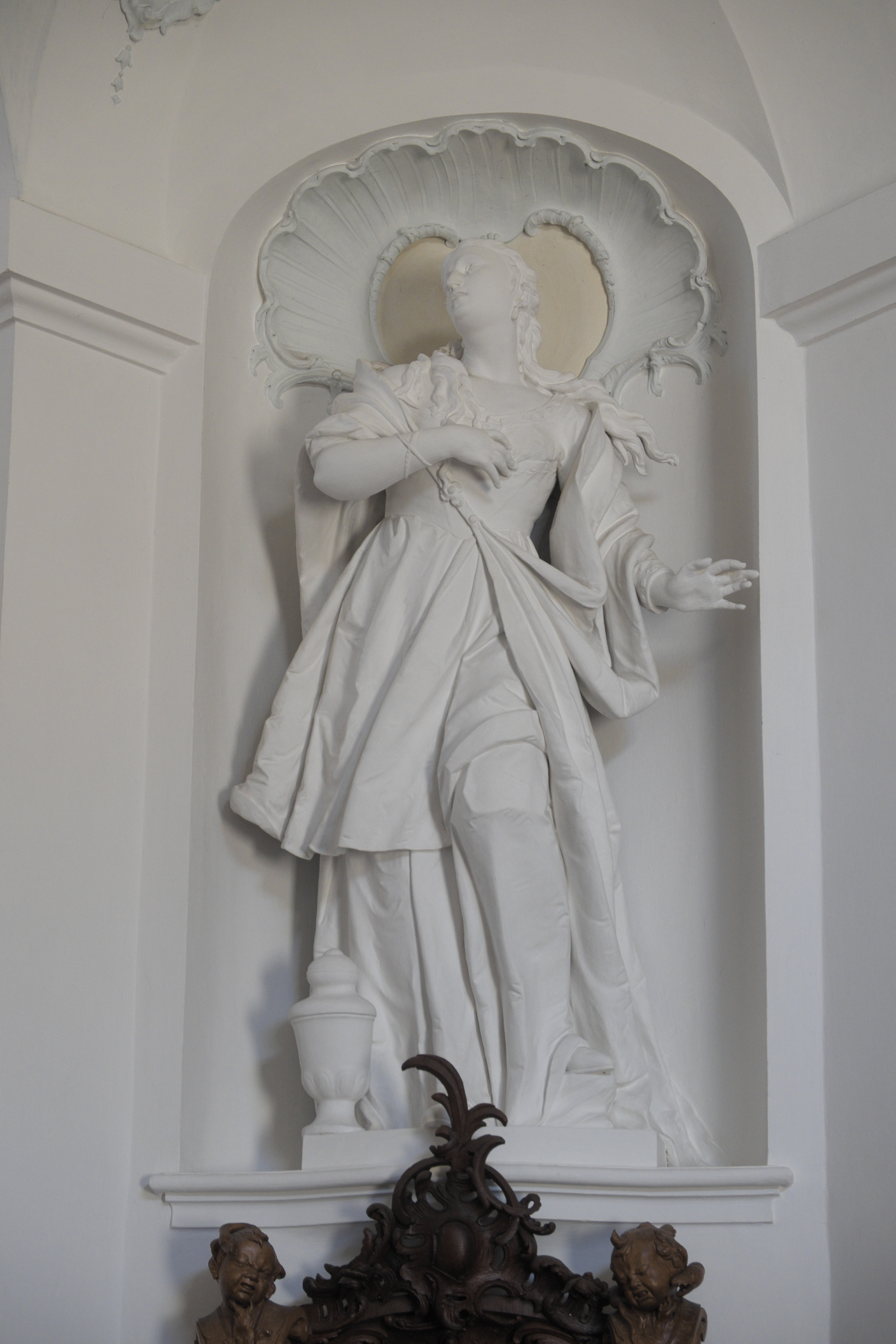 Katholische Pfarrkirche St. Marinus und Anianus, ehemalige Abteikirche des Benediktinerklosters Rott in Rott am Inn im Landkreis Rosenheim (Bayern/Deutschland), weiß gefasste Holzfigur in der Vorhalle